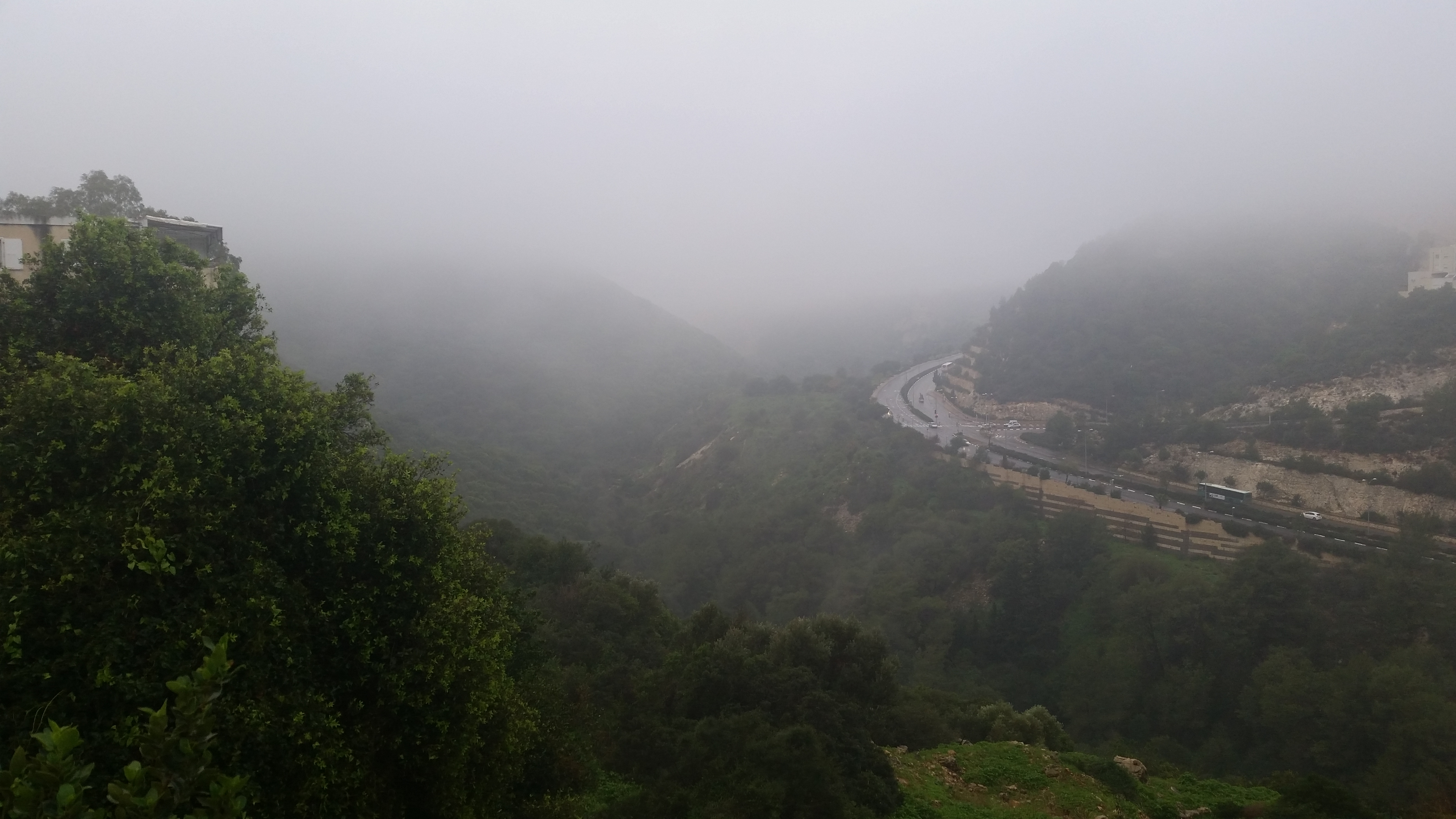 כביש 705 עובר בעיר נשר ומוביל מכביש 752 לאוניברסיטת חיפה ושכונת דניה בחיפה צילום ביום ערפילי משכונת גבעת נשר